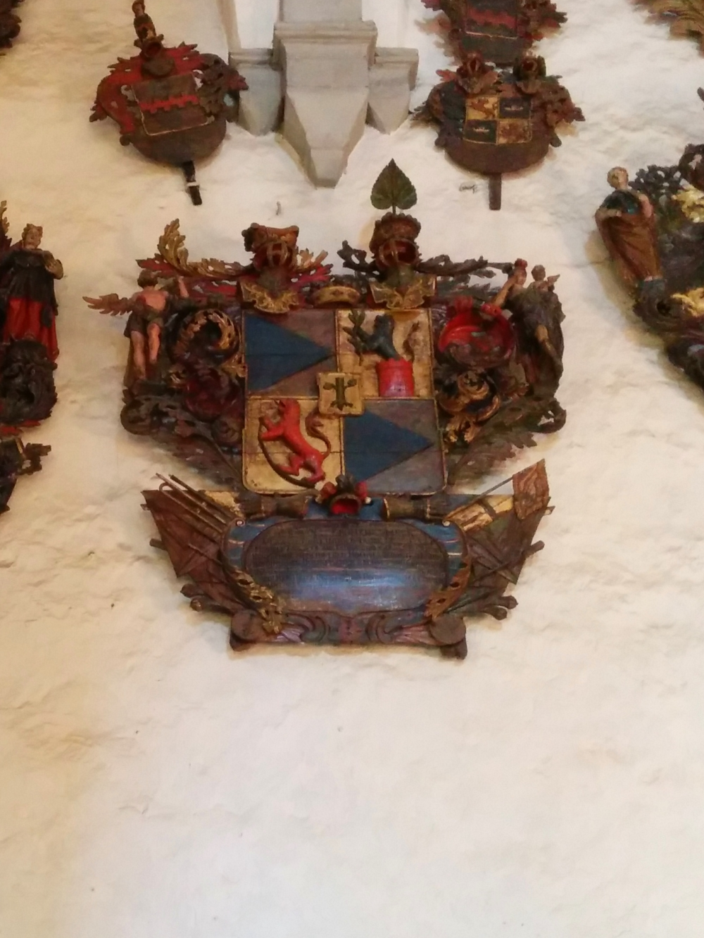 Otto Reinhold von Taube vappepitaaf Tallinna Toomkirikus